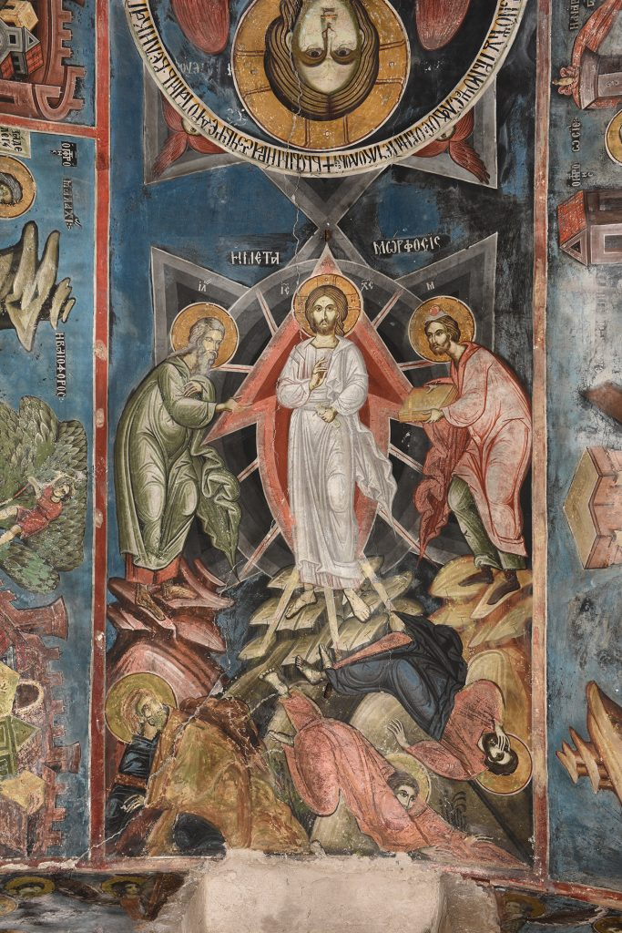 Стенописи от свода на наоса на църквата „Свети Никола Топлички“, 1537 година.)